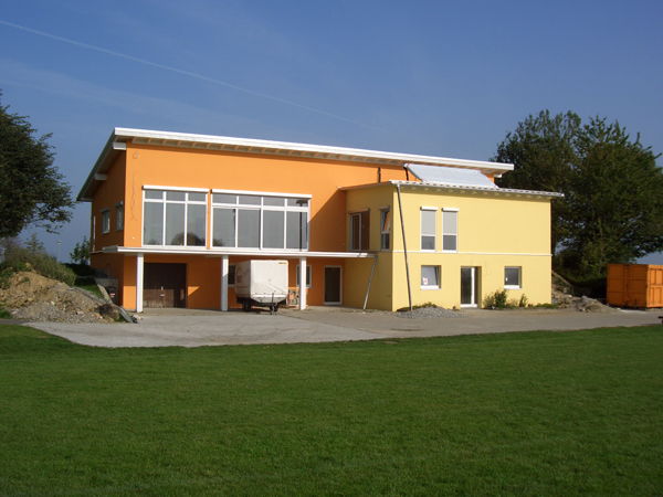 Das neue Sportheim des SV Horgenzell